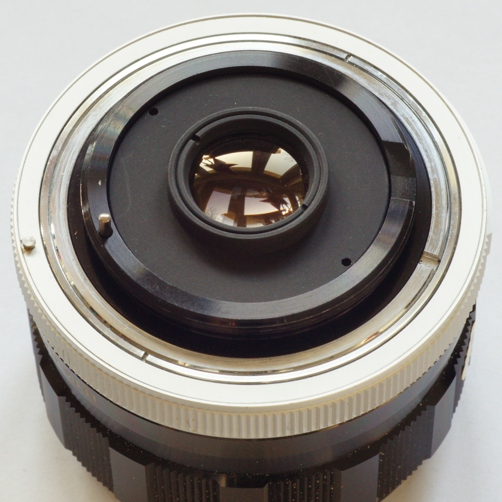 M42 Offenblendmessung Olympus